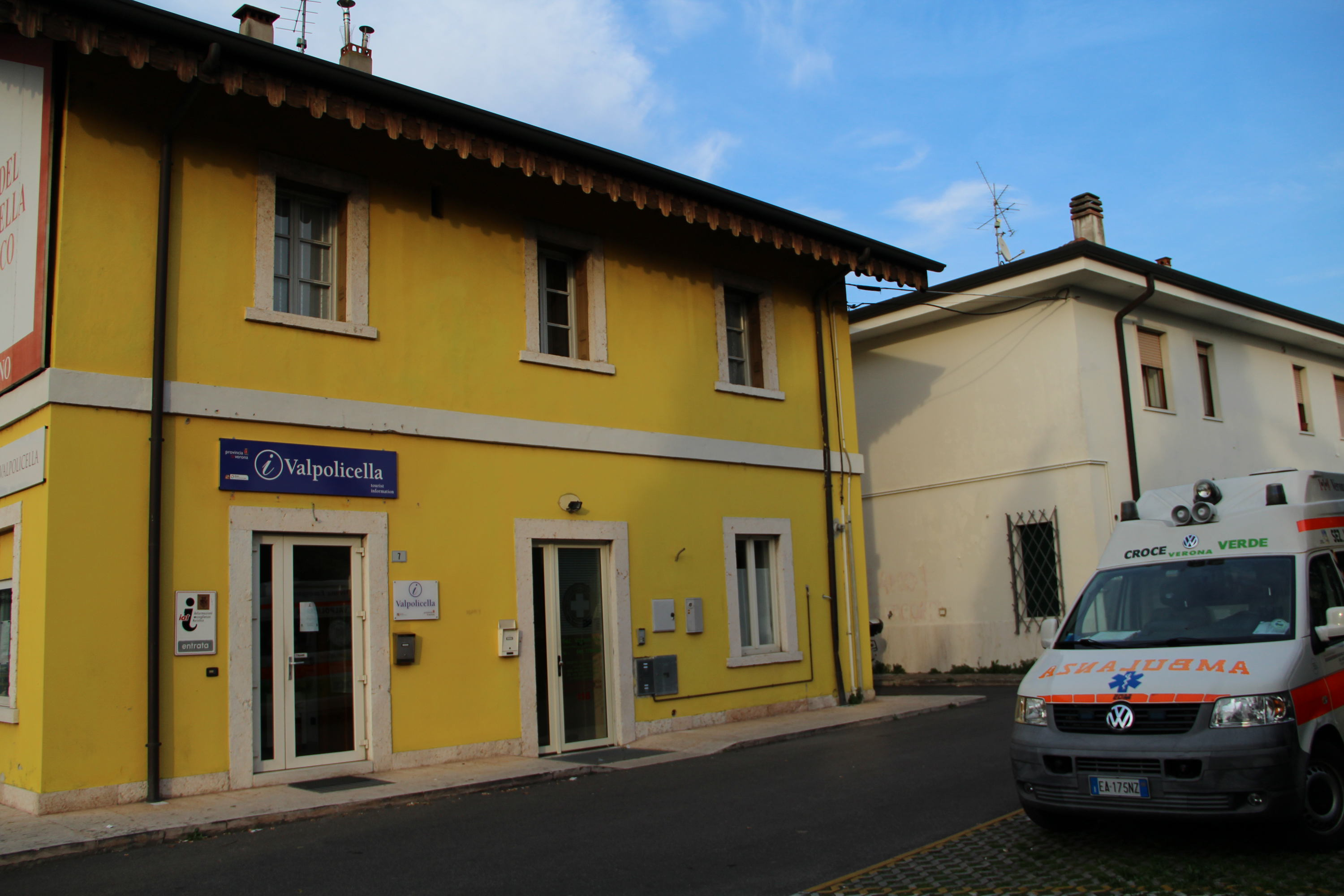 L'attuale sede della pro loco Valpolicella e della Croce Verde sez. Valpolicella, a San Pietro in Cariano. L'edificio, costruito nei primi anni del XX secolo, inizialmente era utilizzato come stazione ferroviaria della linea, ora soppressa, Verona-Caprino-Garda.